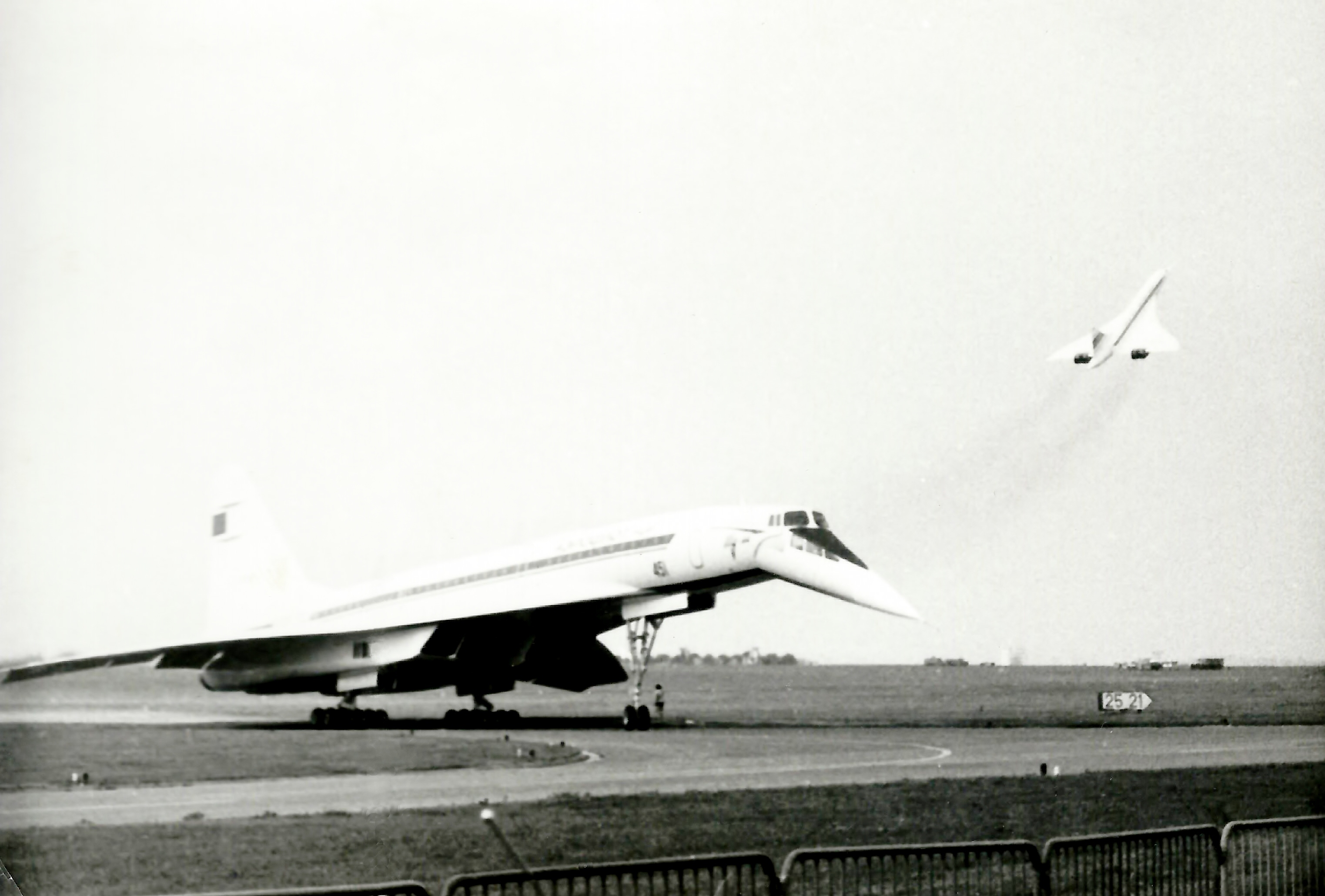 Tupolev 144 au Salon du Bourget 1973, avec Concorde en vol de démonstration